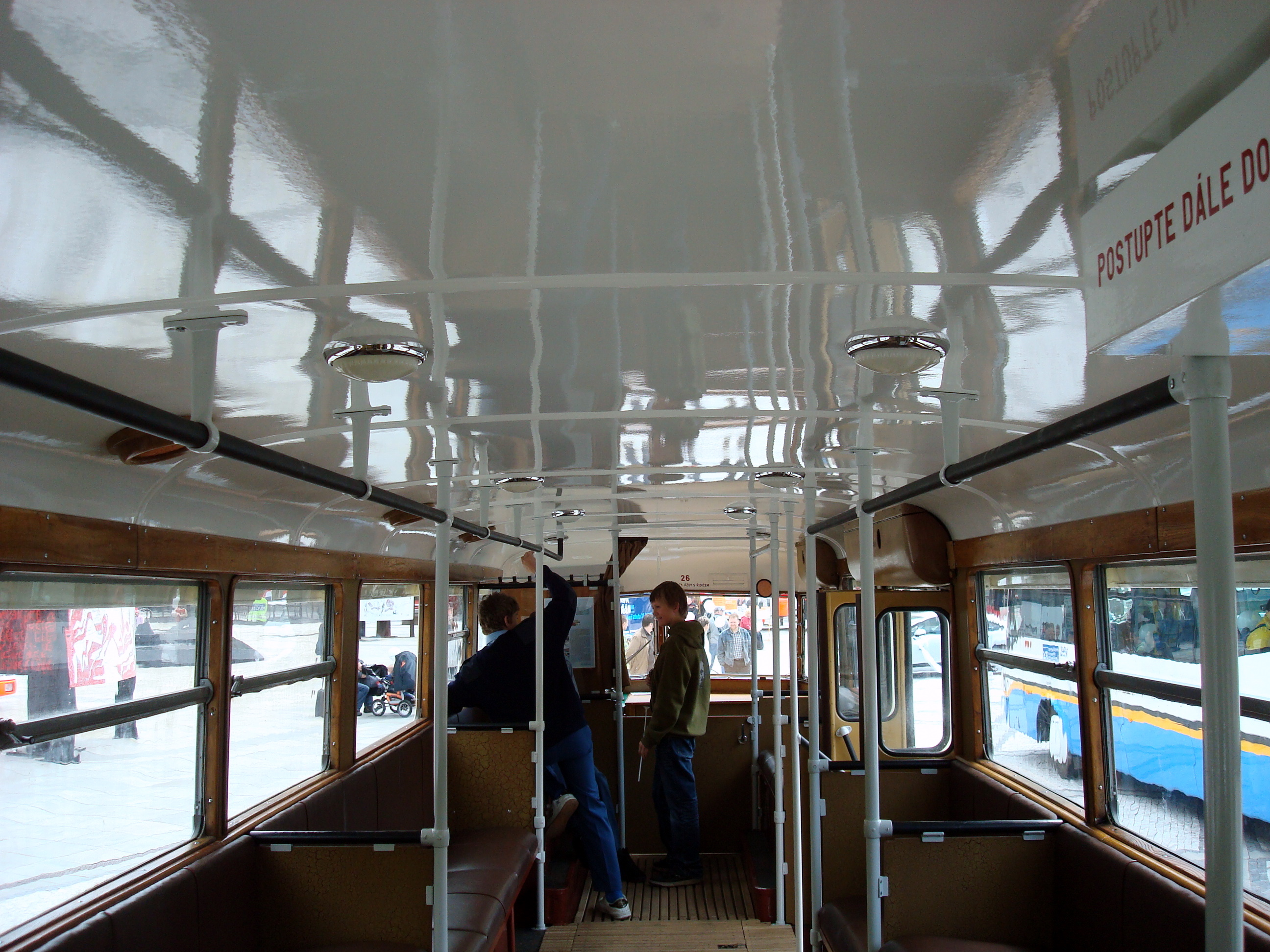 Interiér historického trolejbusu Tatra T 400 v Ostravě